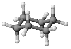 cicloalcani - modello molecolare del cicloesano in conformazione a sedia Disegnato da Paginazero